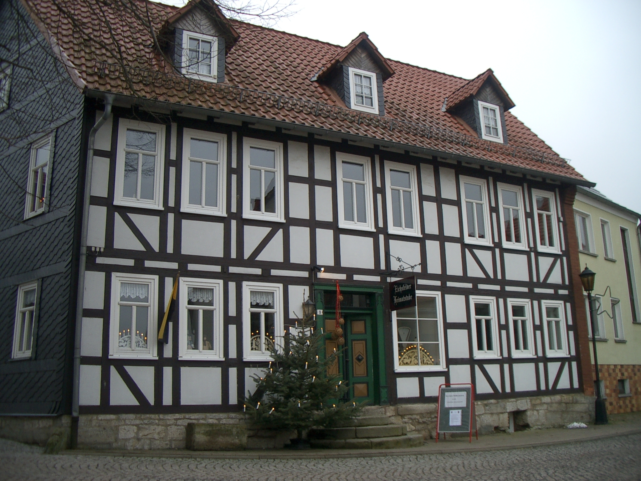 Heimatmuseum Küllstedt